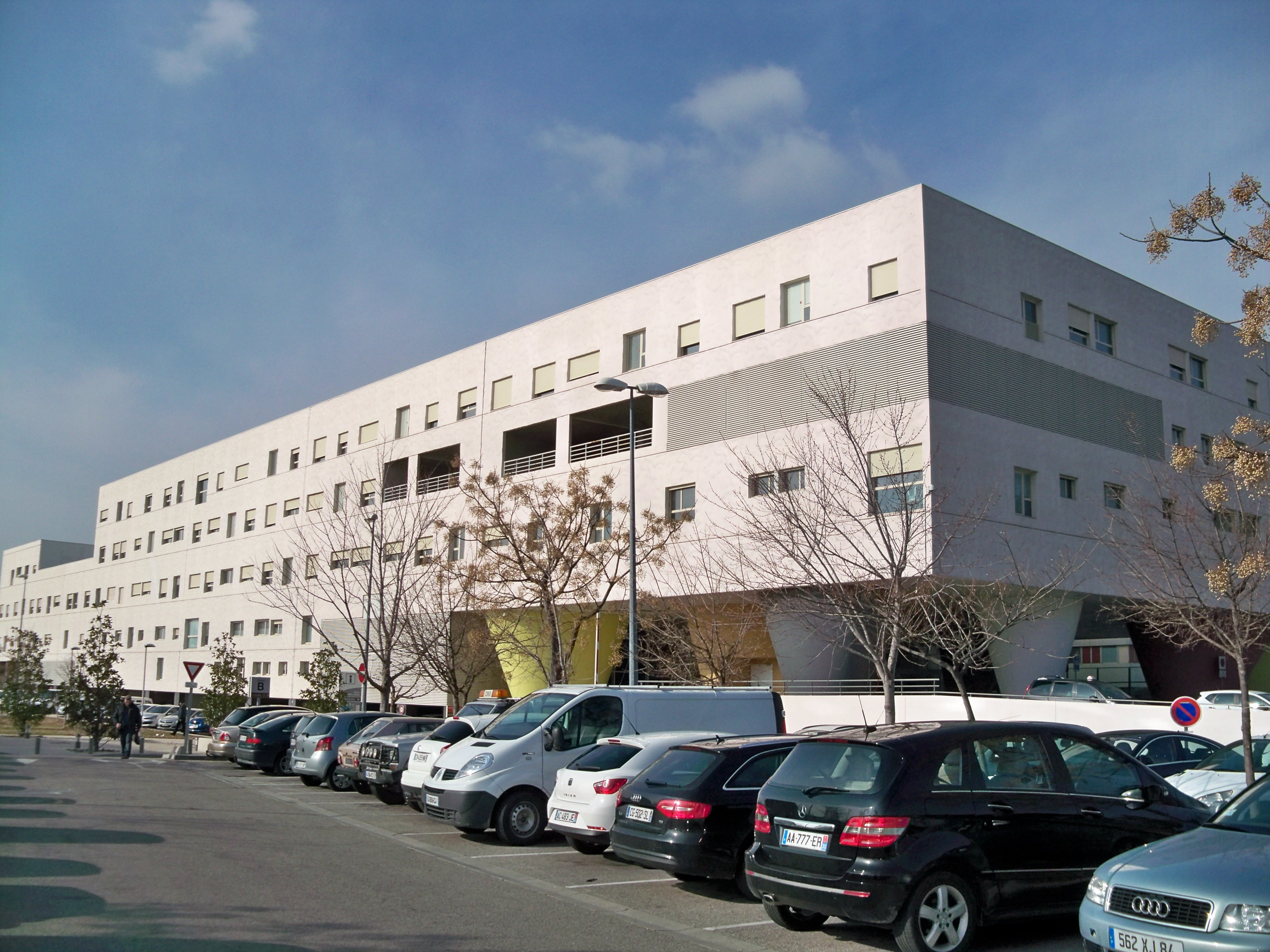 hôpital Henri Duffaut d'Avignon